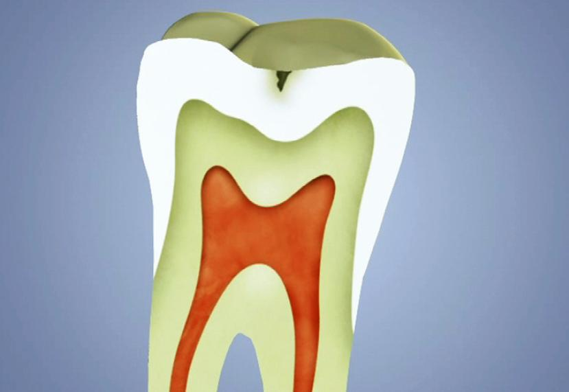 1.stadium zubniho kazu